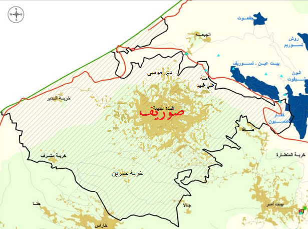 خرب و قرى صوريف و الخارطة السياسية للمدينة